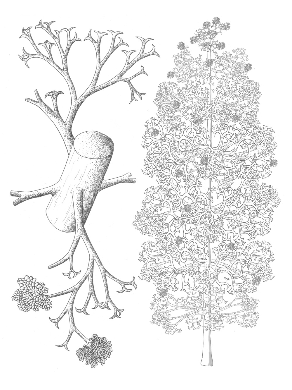 Reconstrucción artística del vegetal del Devónico inferior Pertica quadrifaria realizada a partir de la descripción dada de sus restos fósiles del yacimiento paleontológico de Trout Valley. Se añade un detalle de la inserción en espiral de sus ramas laterales, de la división dicotómica de éstas y del clúster esférico de esporangios que poseían.